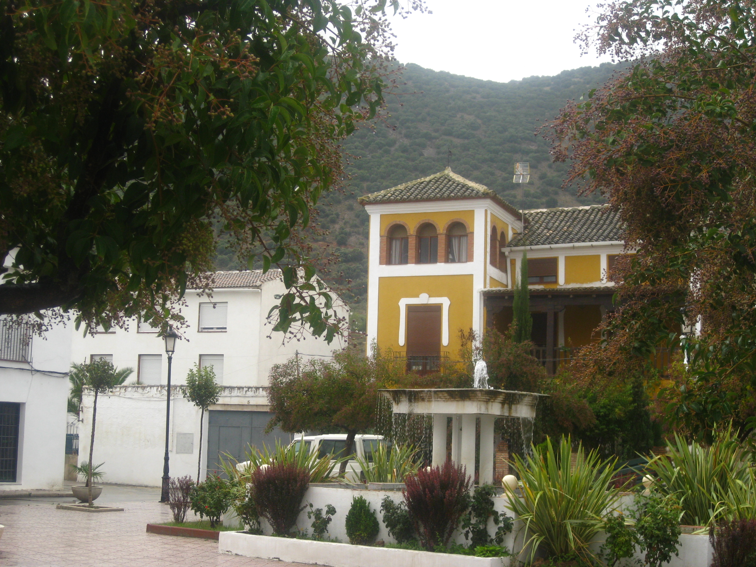 Fuente frente a la iglesia. Octubre de 2012